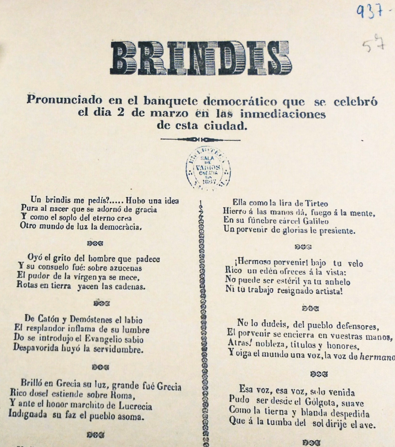 BRINDIS. Pronunciado en el banquete democrático que se celebró el dia 2 de marzo en las inmediaciones de esta ciudad.Transcription: Un brindis me pedís?..... Hubo una idea Pura al nacer que se adornó de gracia Y como el soplo eterno crea Otro mundo de luz la democracia. Oyó el grito del hombre que padece Y su consuelo fué: sobre azucenas El pudor de la vírgen ya se mece, Rotas en tierra yacen las cadenas Brilló en Grecia su luz, grande fue Grecia Rico dosel estiende sobre Roma, Y ante el honor marchito de Lucrecia Indignada su faz el pueblo asoma. Vedla sufrir! prepara el fanatismo Ya de triunfo muestras placenteras, Pero la idea rie ante el abismo Y vuela en el vapor de las hogueras. Ella como la lira de Tirteo Hierro á las manos dá, fuego á la mente, En su fúnebre cárcel Galileo Un porvenir de glorias le presiente ¡Hermoso porvenir! bajo tu velo Rico un edén ofreces á la vista: No puede ser estéril ya tu anhelo Ni tú trabajo resignado artista! No lo dudeis, del pueblo defensores, El porvenir se encierra en vuestras manos, Atras! nobleza, títulos y honores, Y oiga el mundo una voz, la voz de hermanos. Esa voz, esa voz, solo venida Pudo ser desde el Gólgota, suave Como la tierna y blanda despedida Que á la tumba del sol dirije el ave. Esa voz, esa voz, y solo ella De la razón dormida es el aviso Es el cielo luminosa estrella Y de la tierra forma un Paraíso. Tú llevaras ventura á los hogares Y al corrompido mundo la armonía: Pobre bardo, te ofrezco mis cantares, Pobre bardo, á ti doy mi idolatría.